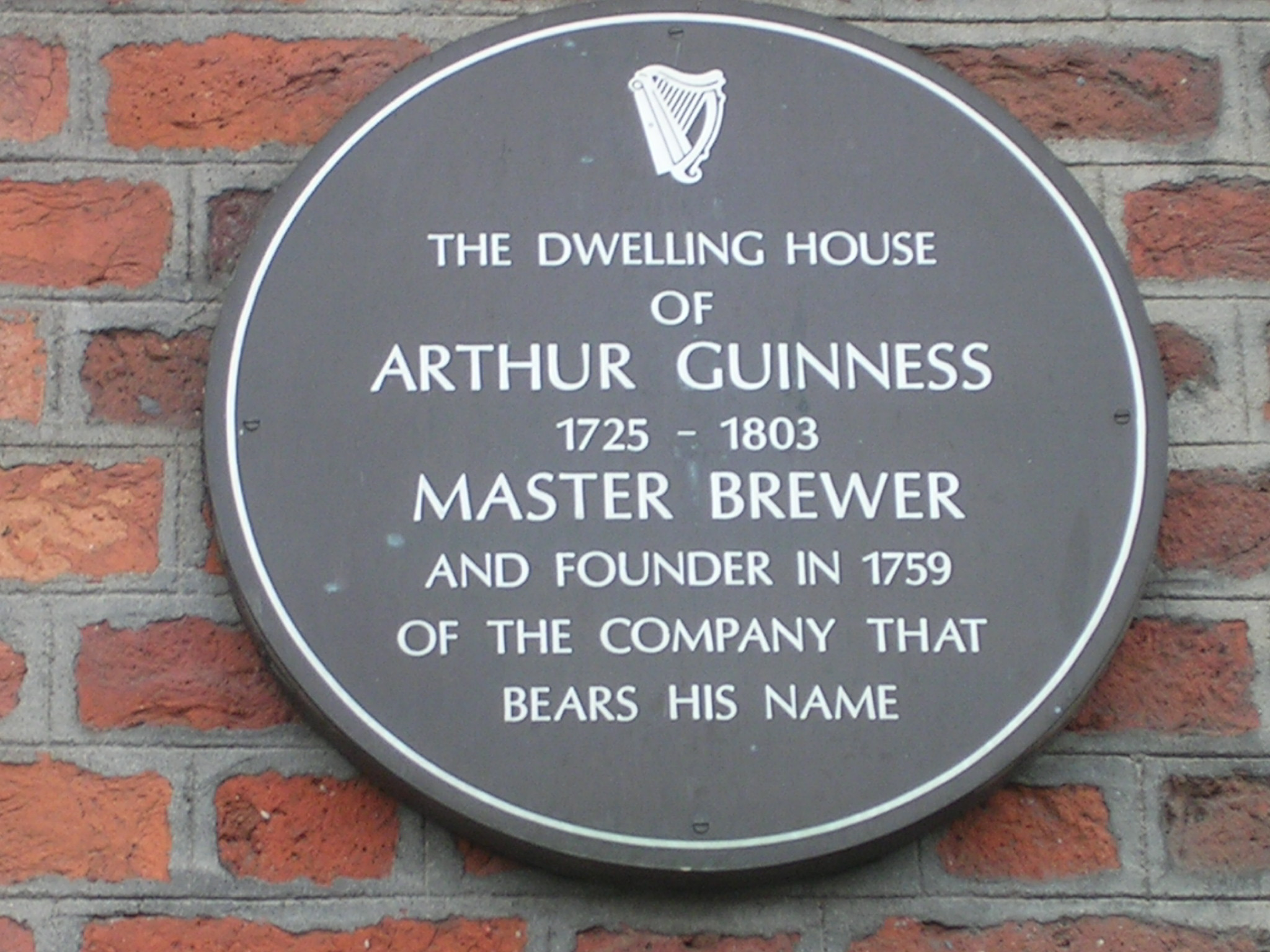 insegna che si trova fuori dalla storica fabbrica della guinness